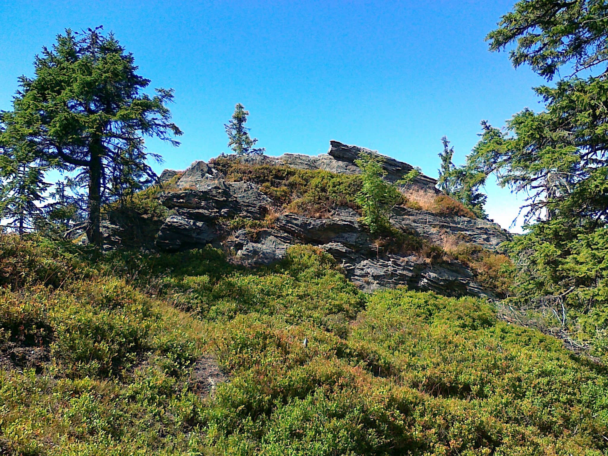 Skalisko z najwyższym punktem góry Ostružná - 1184 m n.p.m.